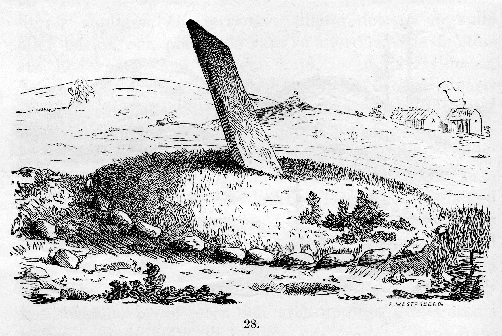 Gravhög med rest sten (RAÄ-nummer Härad 24:1) i Brunna, Härads socken, Åkers härad, Strängnäs kommun, Södermanland, Sverige. Träsnitt av E. Westerberg ur Kongl. Vitterhets Historie och Antiqvitets Akademiens Månadsblad 1873 sidan 72 figur 28.